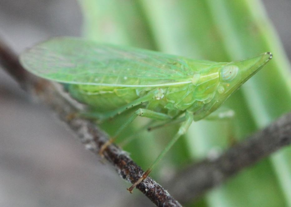 Dictyophara europaea am 4.9.2017 in der Schwetzinger Hardt